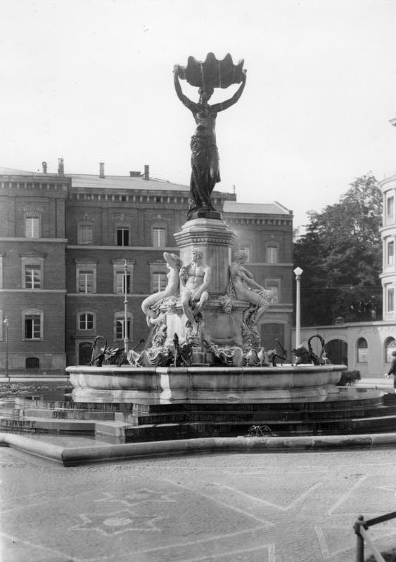 Görlitz (Niederschlesien) Zierbrunnen auf dem Postplatz